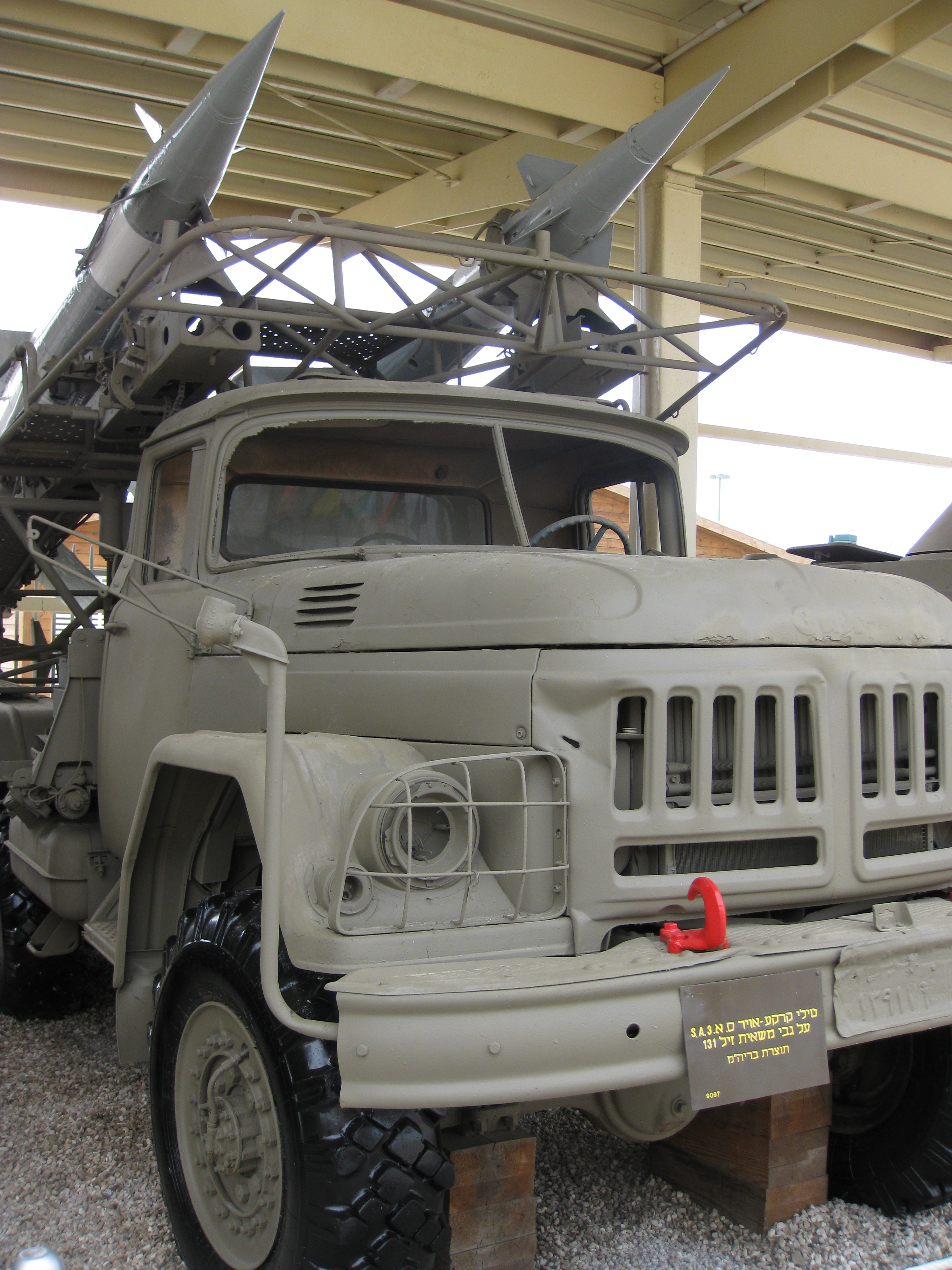 Batey HaOsef Museum מוזיאון בתי האוסף